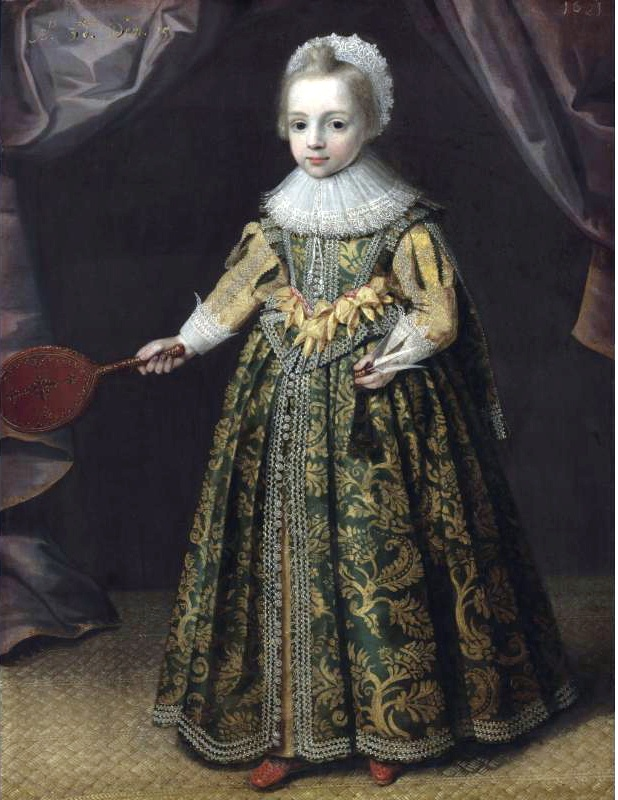 Christine de Suède, âgée de 6 ans (1632)